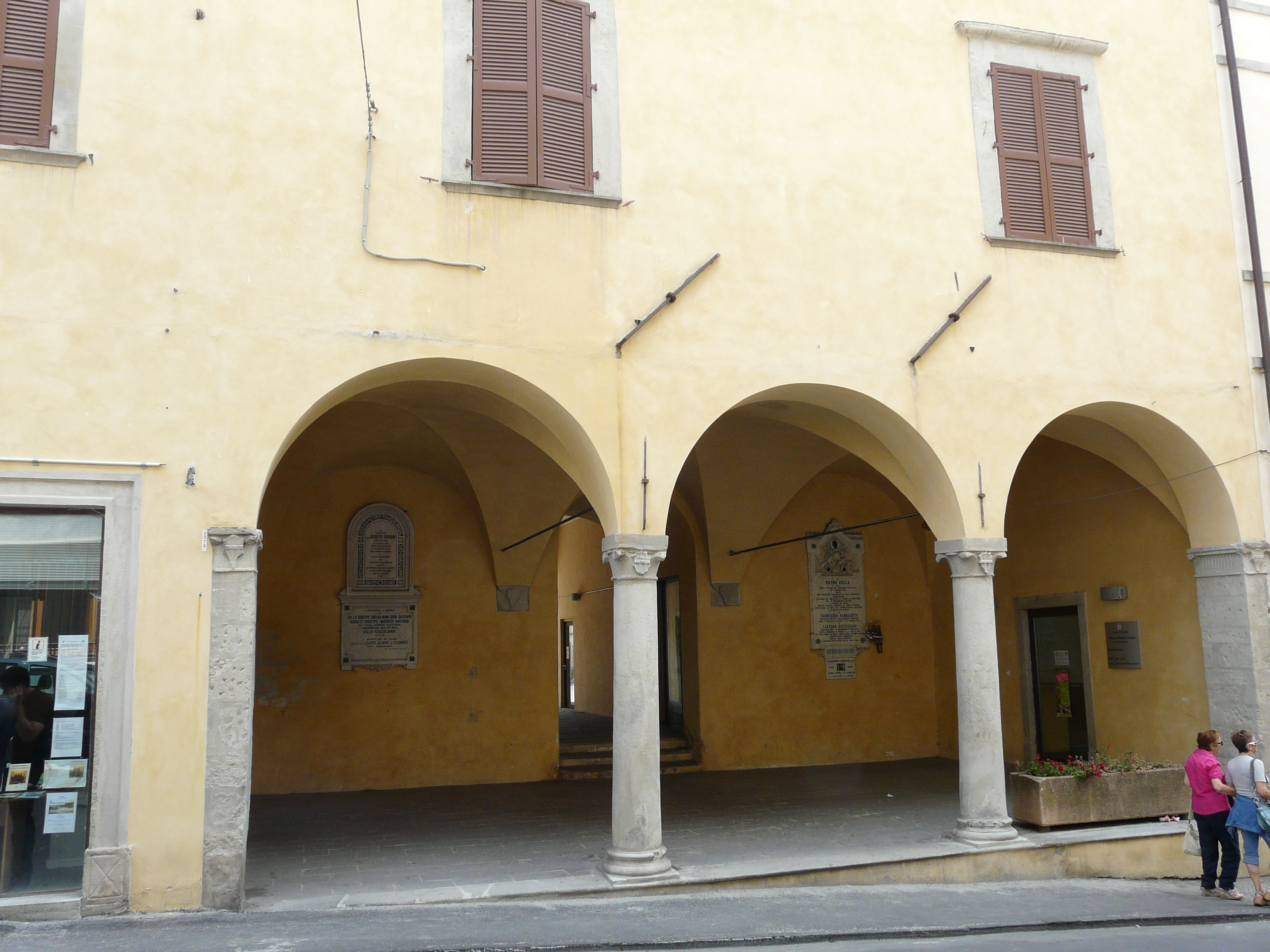 Palazzo Maria Luigia di Bardi, Emilia-Romagna, Italia